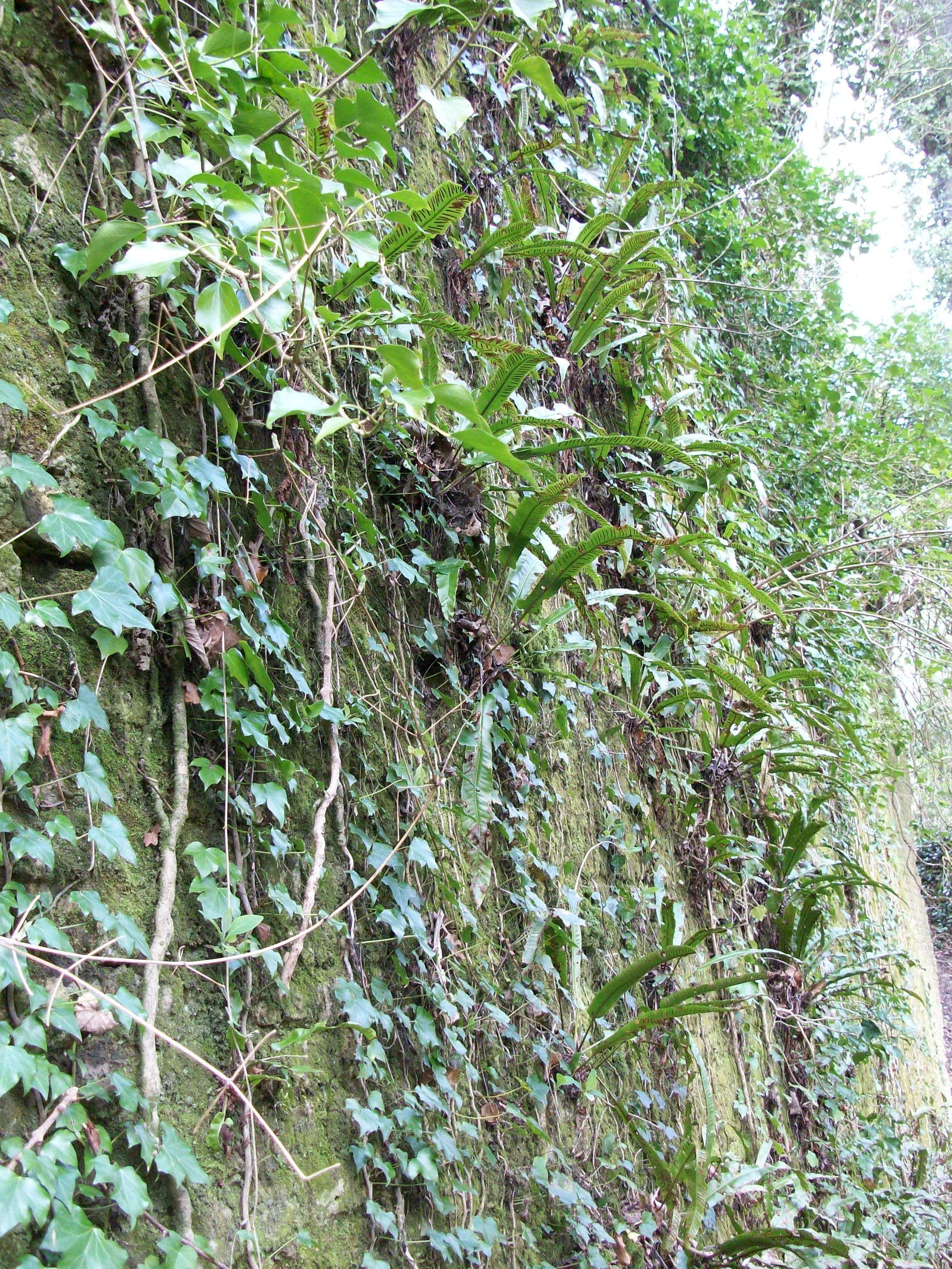 photographie faite dans le secteur de la région dunkerquoise 59 nord france scolopendre fougère